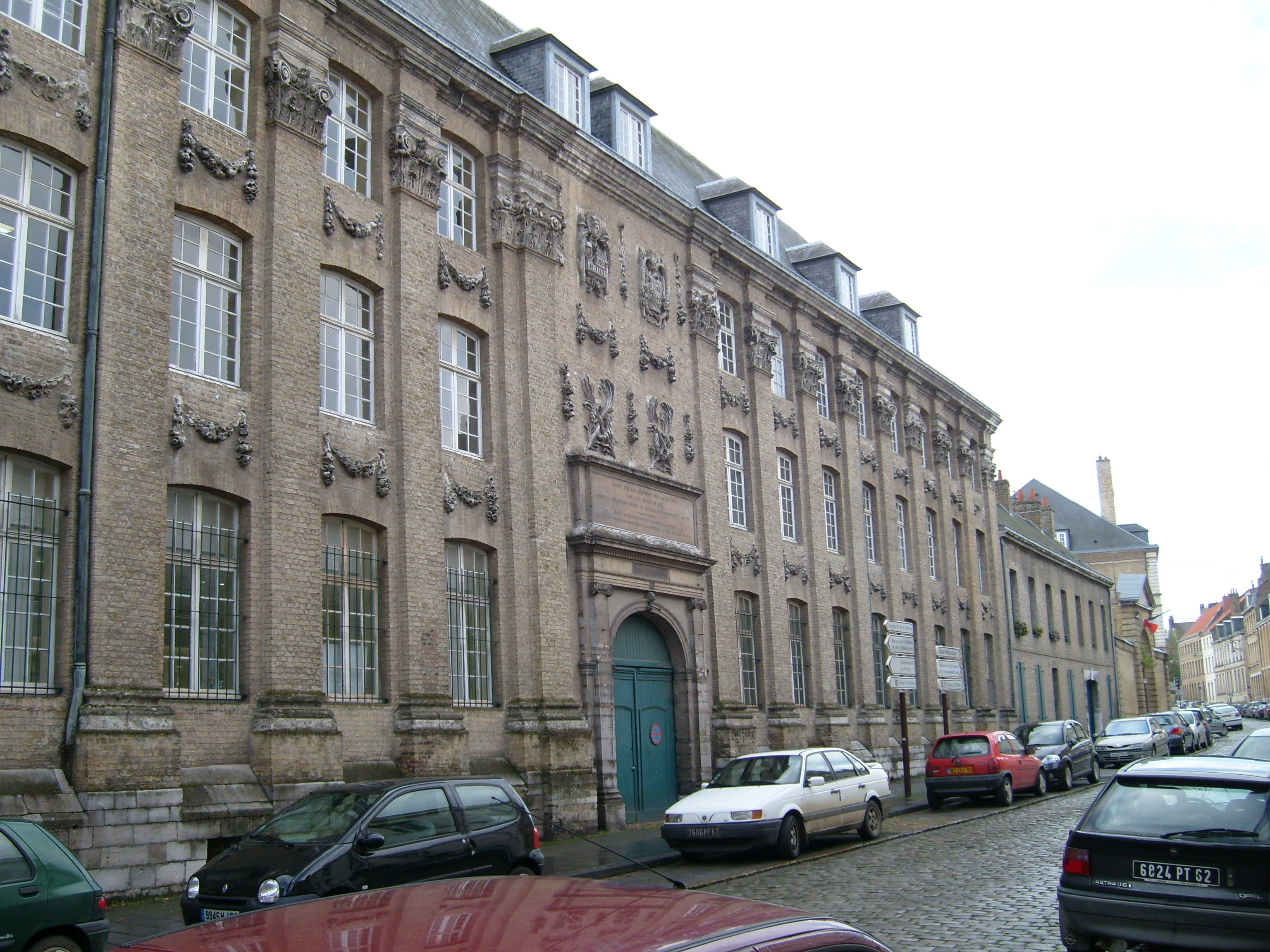 Le Collège des Jésuites Anglais, aujourd'hui Lycée Alexandre Ribot, à Saint Omer